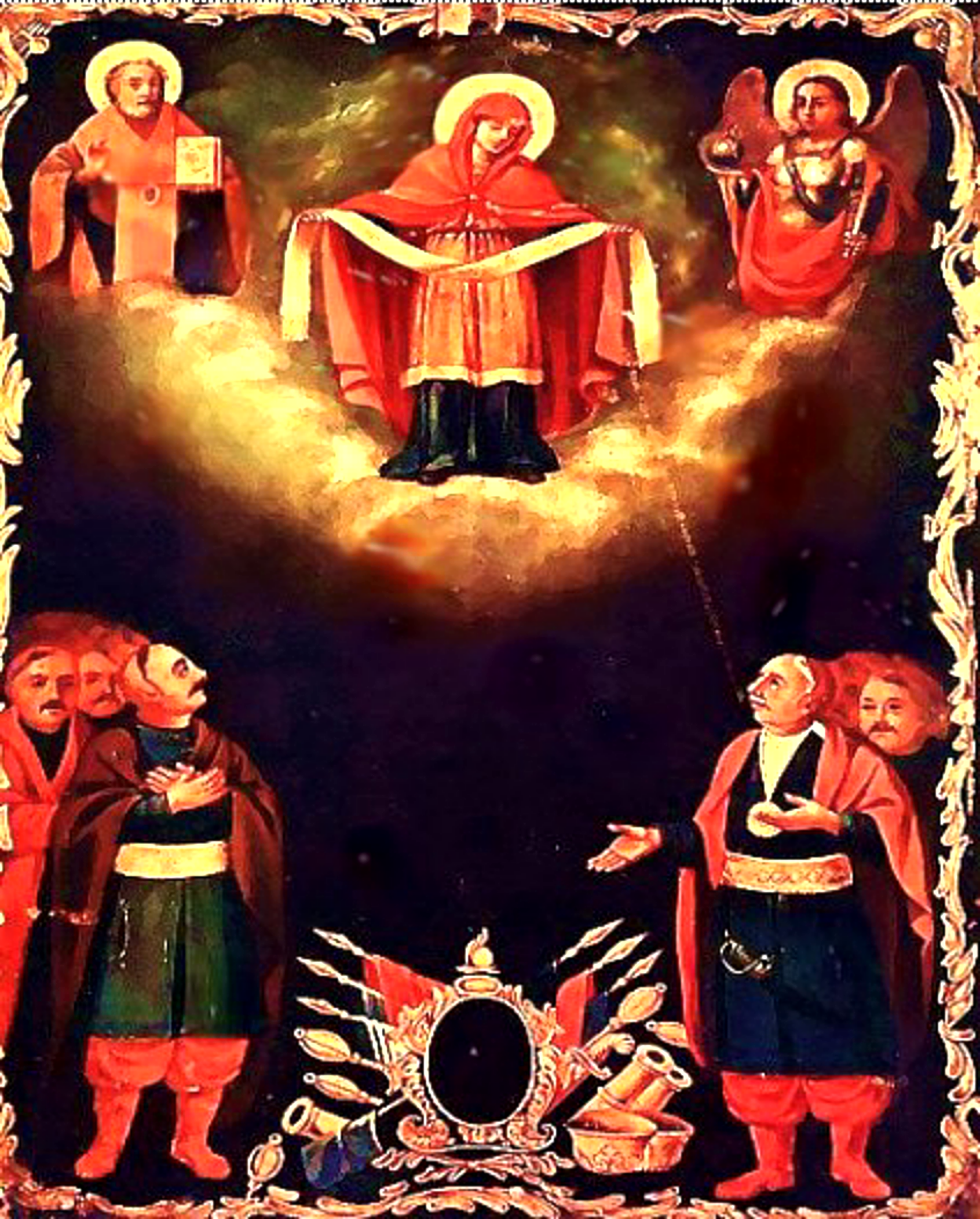 Икона Покрова Пресятой Богородицы с изображением последнего кошевого атамана Запорожской Сечи Петра Калнышевского (справа).